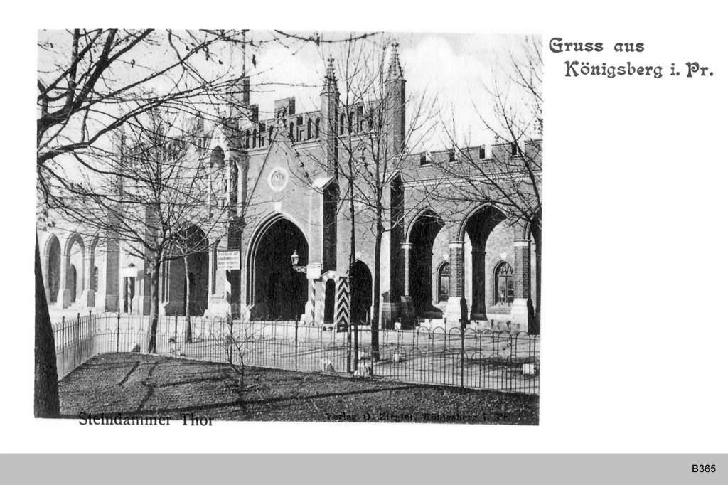 Steindammer Tor